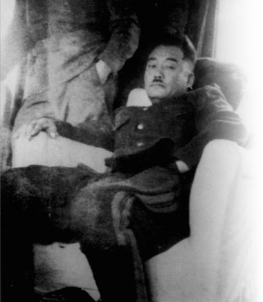 김무정 (1905년 ~ 1952년)